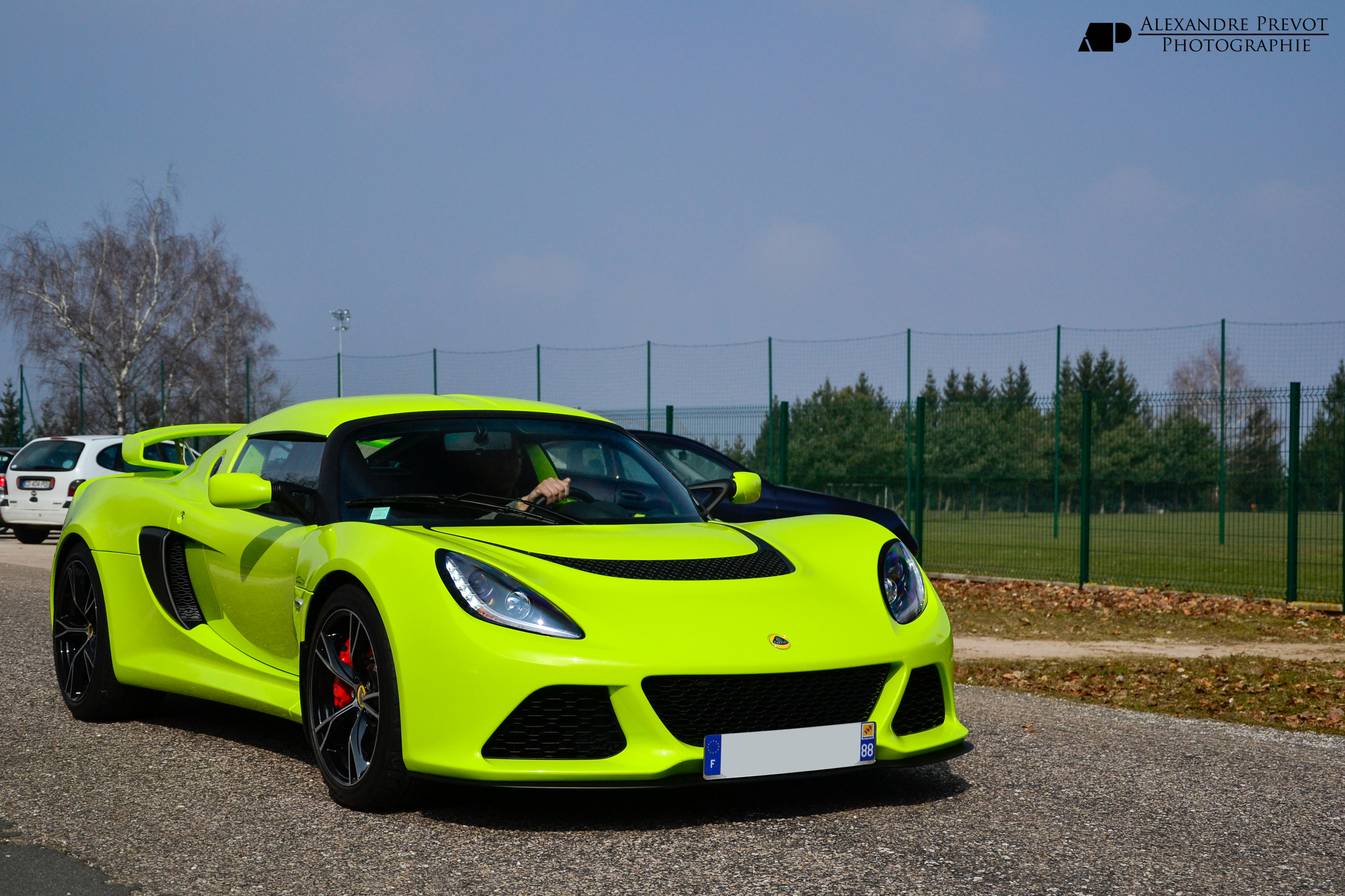 Lotus Exige S V6